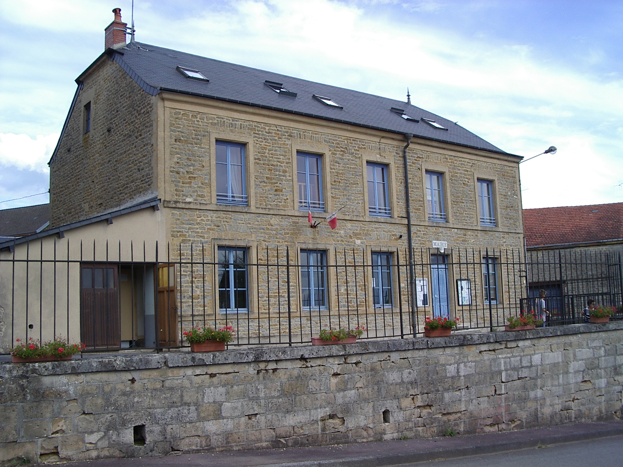 La Mairie : Fleigneux, commune du depardement des Ardennes, France